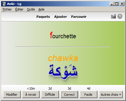 Anki 2.0.31 en français sur Windows 7